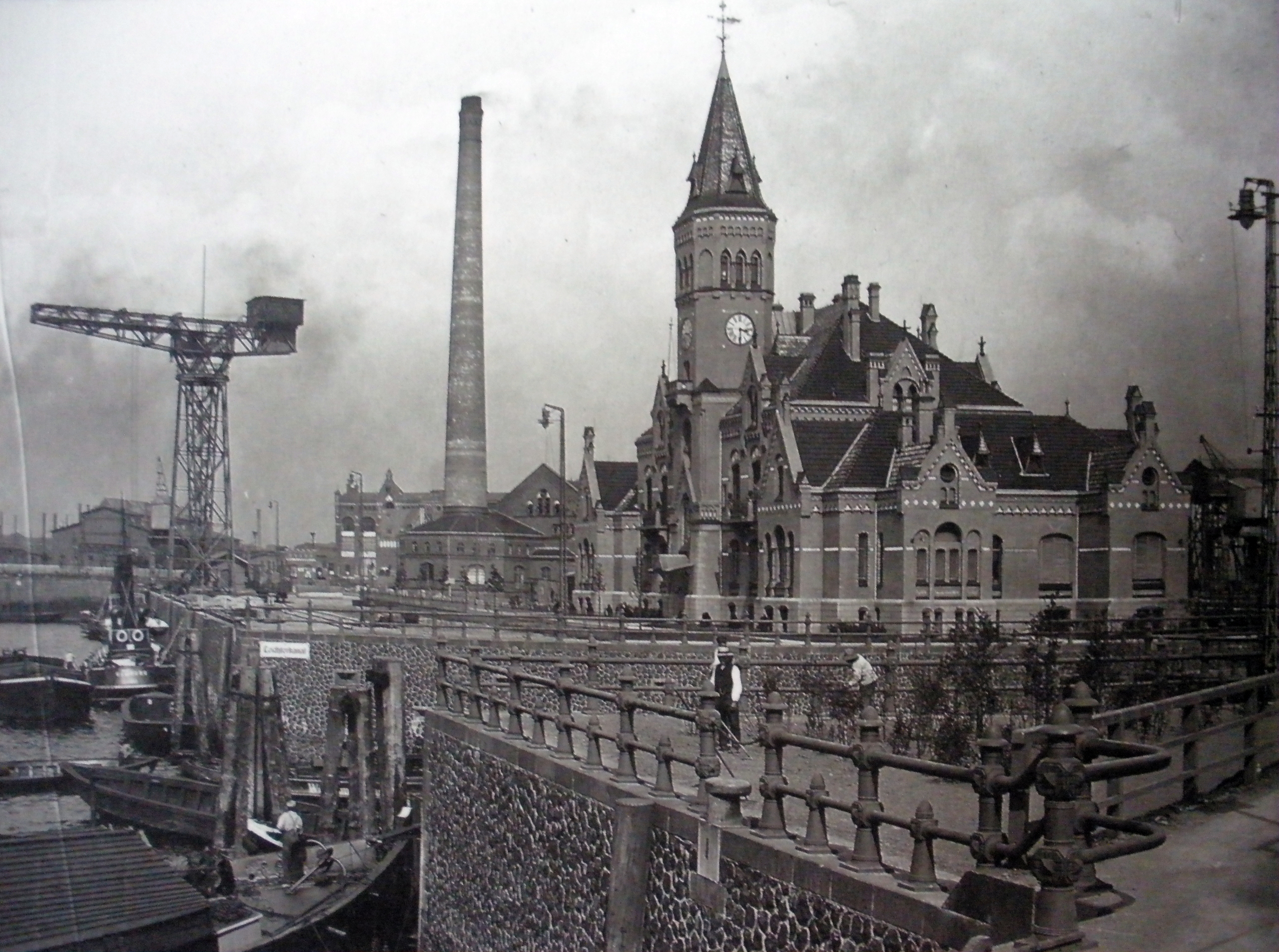 Kaiser-Wilhelm-Hafen (Hamburger Hafen) mit elektrischer Zentralstation für die Kuhwärder Häfen und Verwaltungsgebäude der HAPAG This is a photograph of an architectural monument.